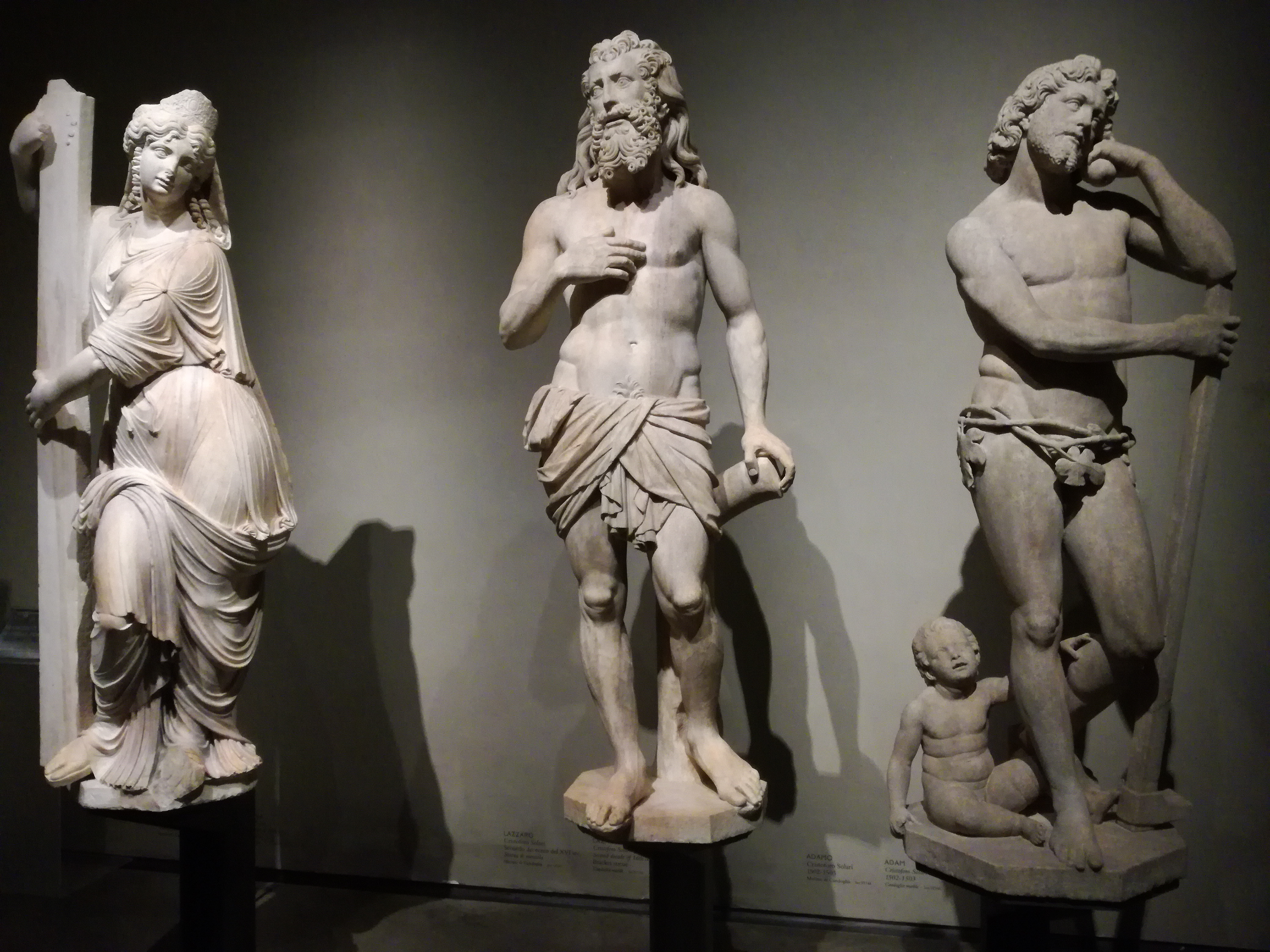 Cristoforo Solari, detto il Gobbo, (1460, morto a Milano nel 1527)Adamo con il piccolo Abele, Lazzaro, Sant'Elena con la croce